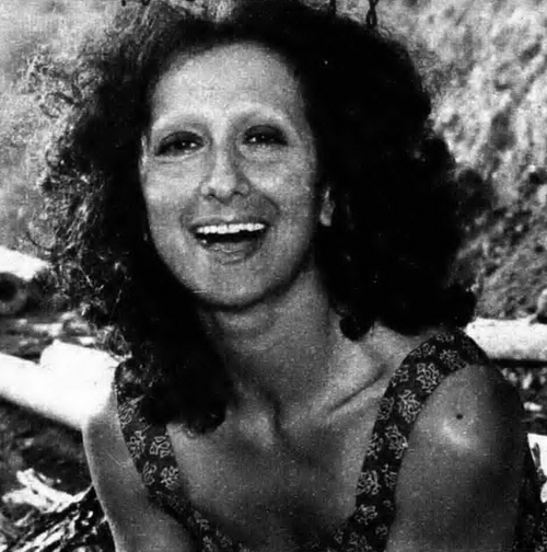 Italian actress Anna Mazzamauro